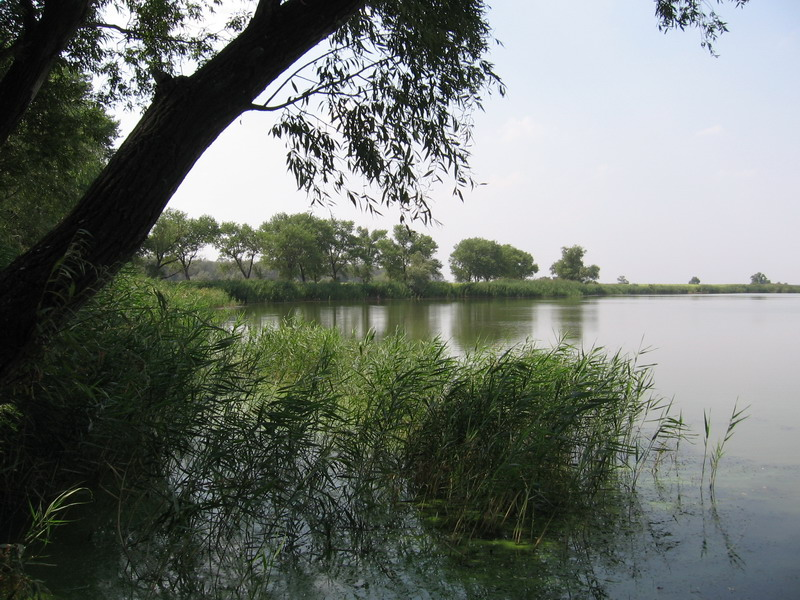 Самара